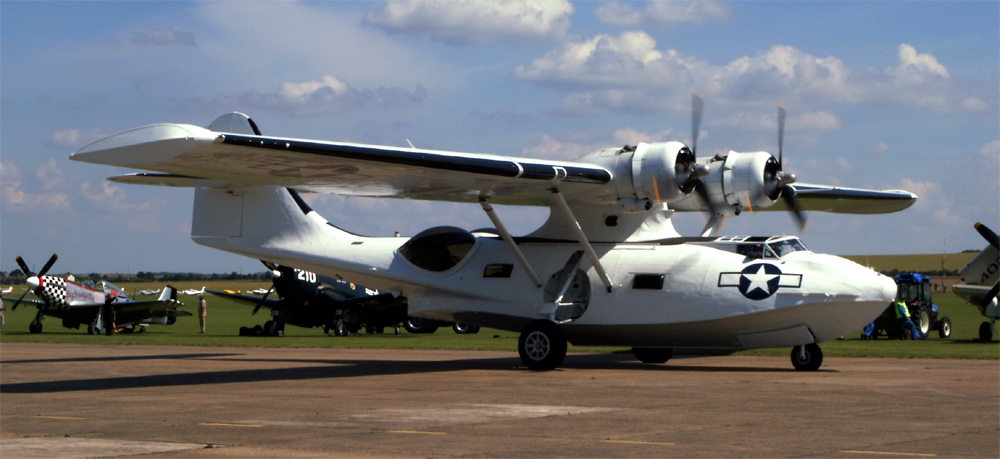 Picture of a PBV-1A Canso at Duxford, England, 10.July 2005.